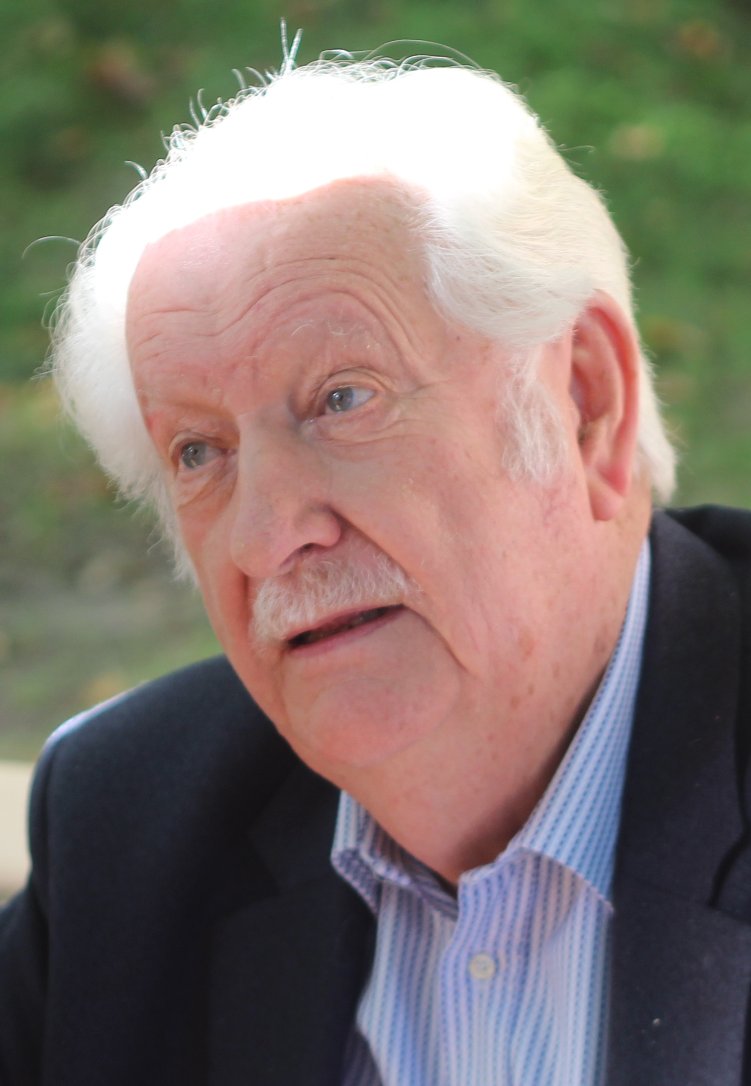 Pierre Bellemare - Forêt des Livres 2014